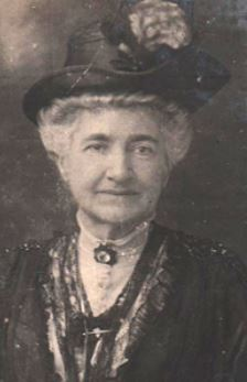 Portrait Nathalie Charlotte Marie van den Steen de Jehay (1852-1919), extrait du faire-part de son décès.